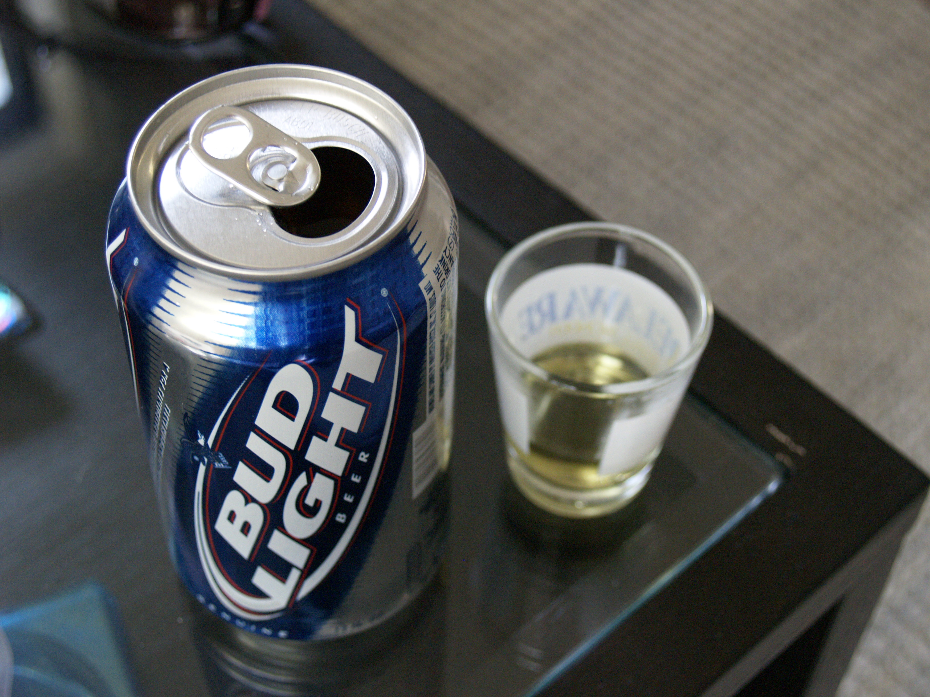 Øl (bud light beer) og snaps